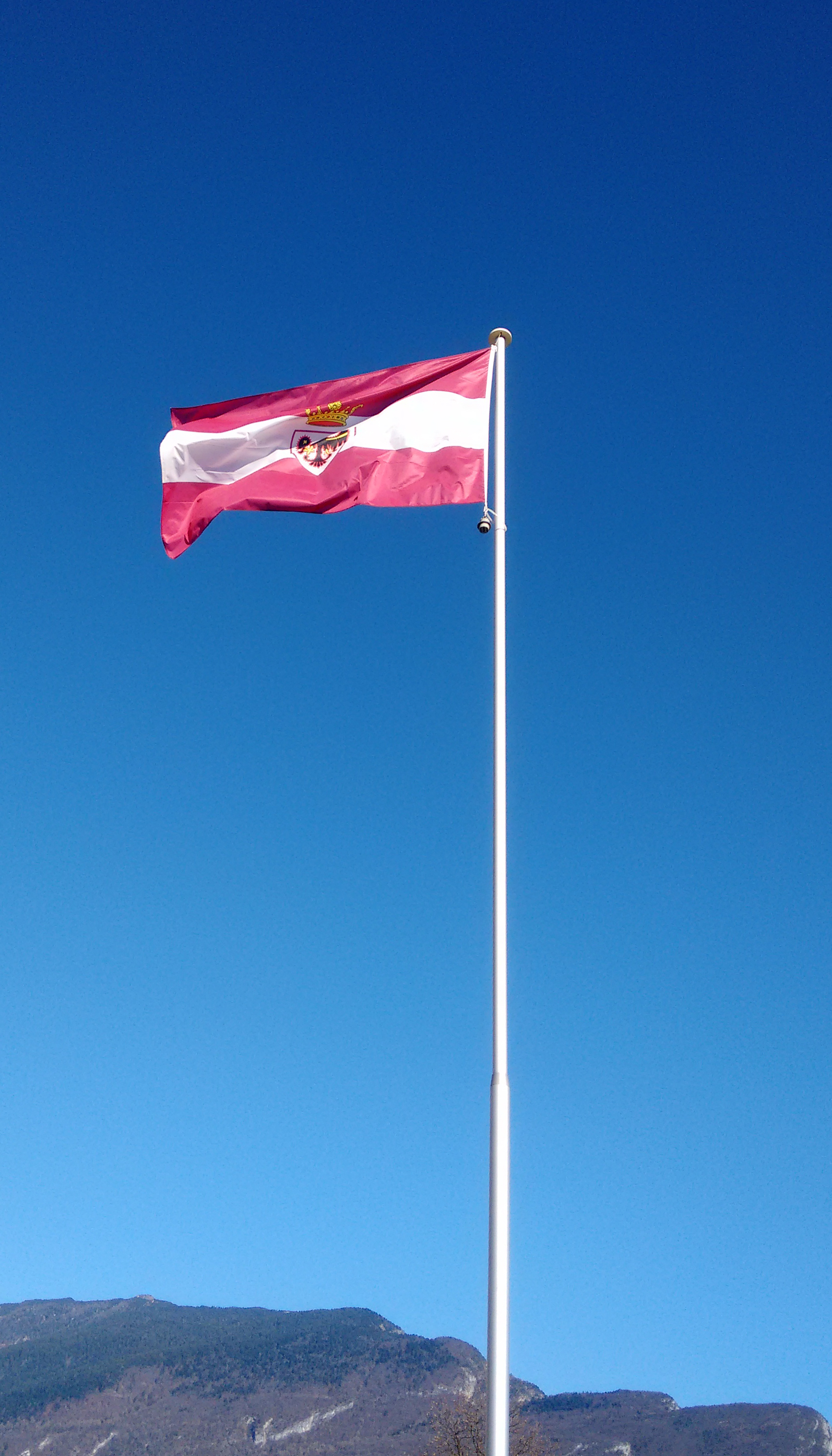 Bandiera della Provincia autonoma di Trento presso il Castel Belasi.